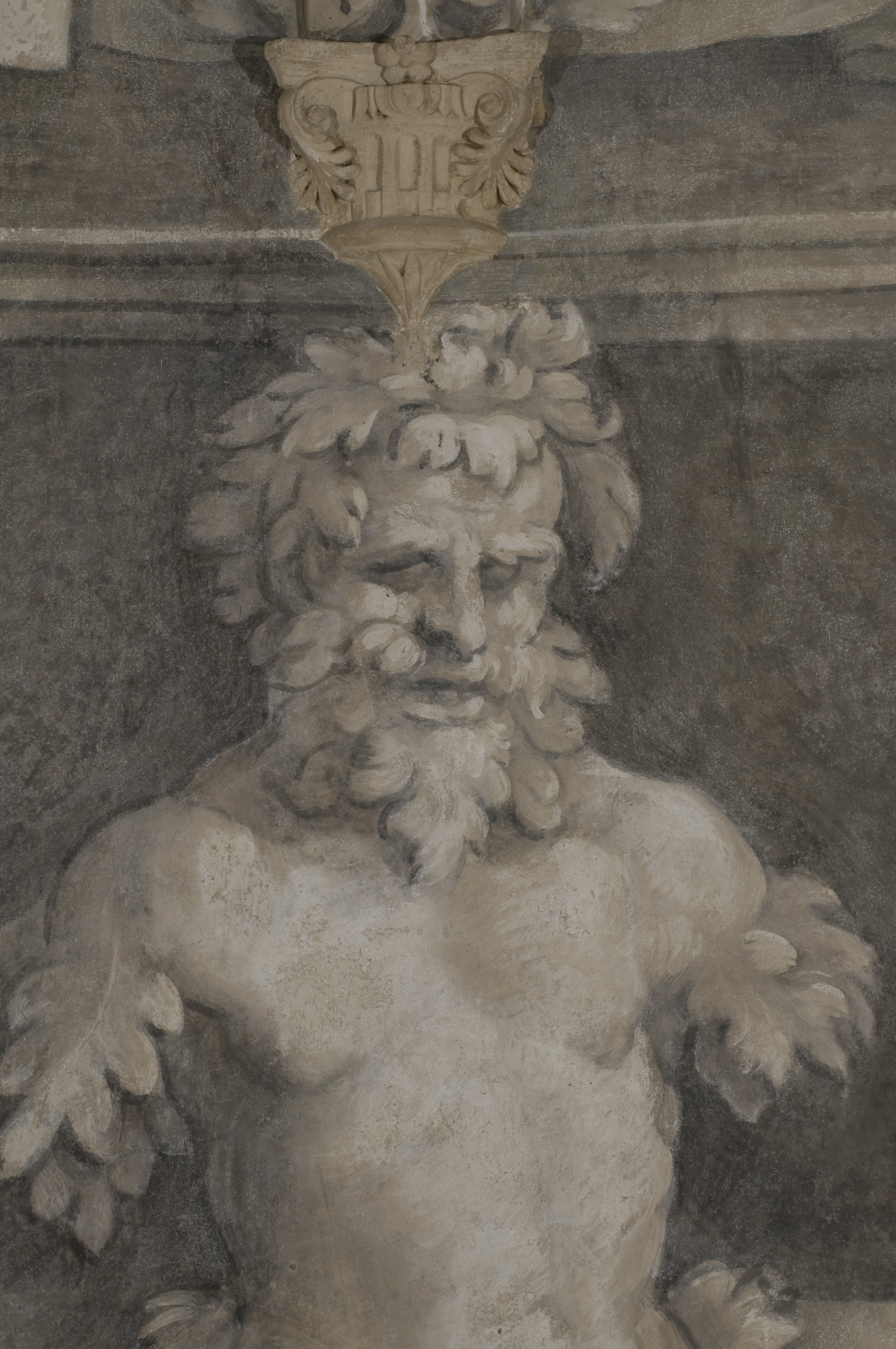 Telamone della Sala di Marte, Amico Aspertini, Rocca Isolani, MInerbio, Bologna, Italy